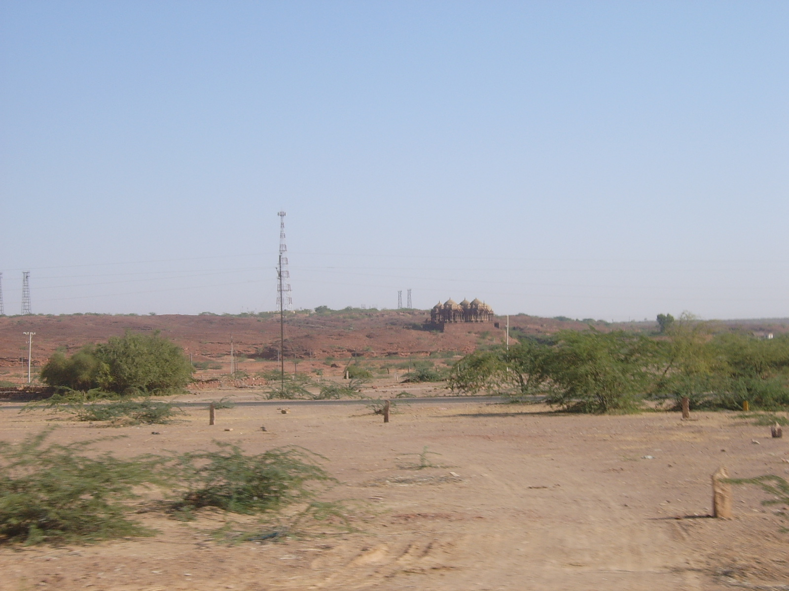 Pokharan, cénotaphes et tour militaire, novembre 2005.